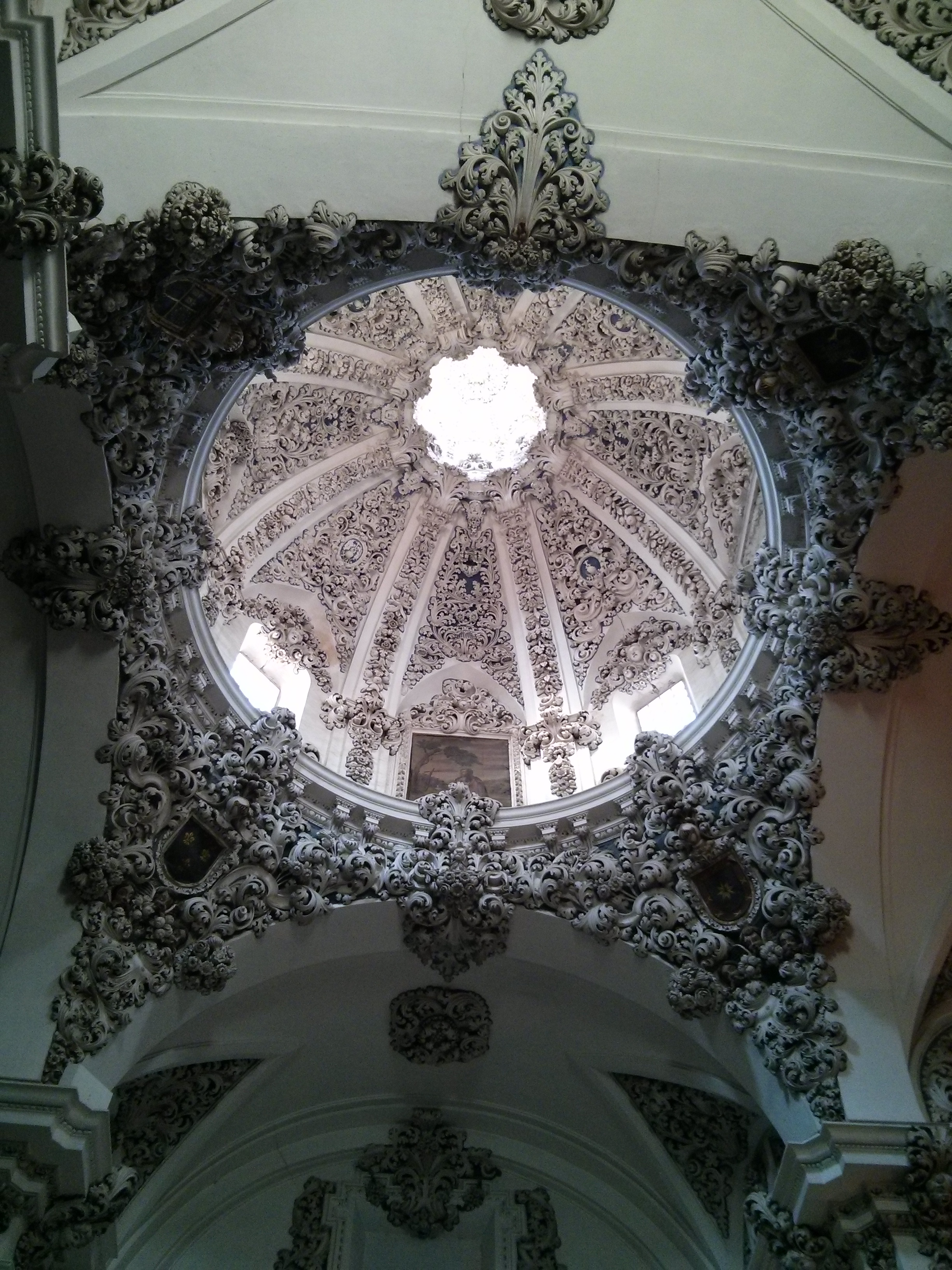 La cupola della chiesa di San Juan de Dios ad Antequera